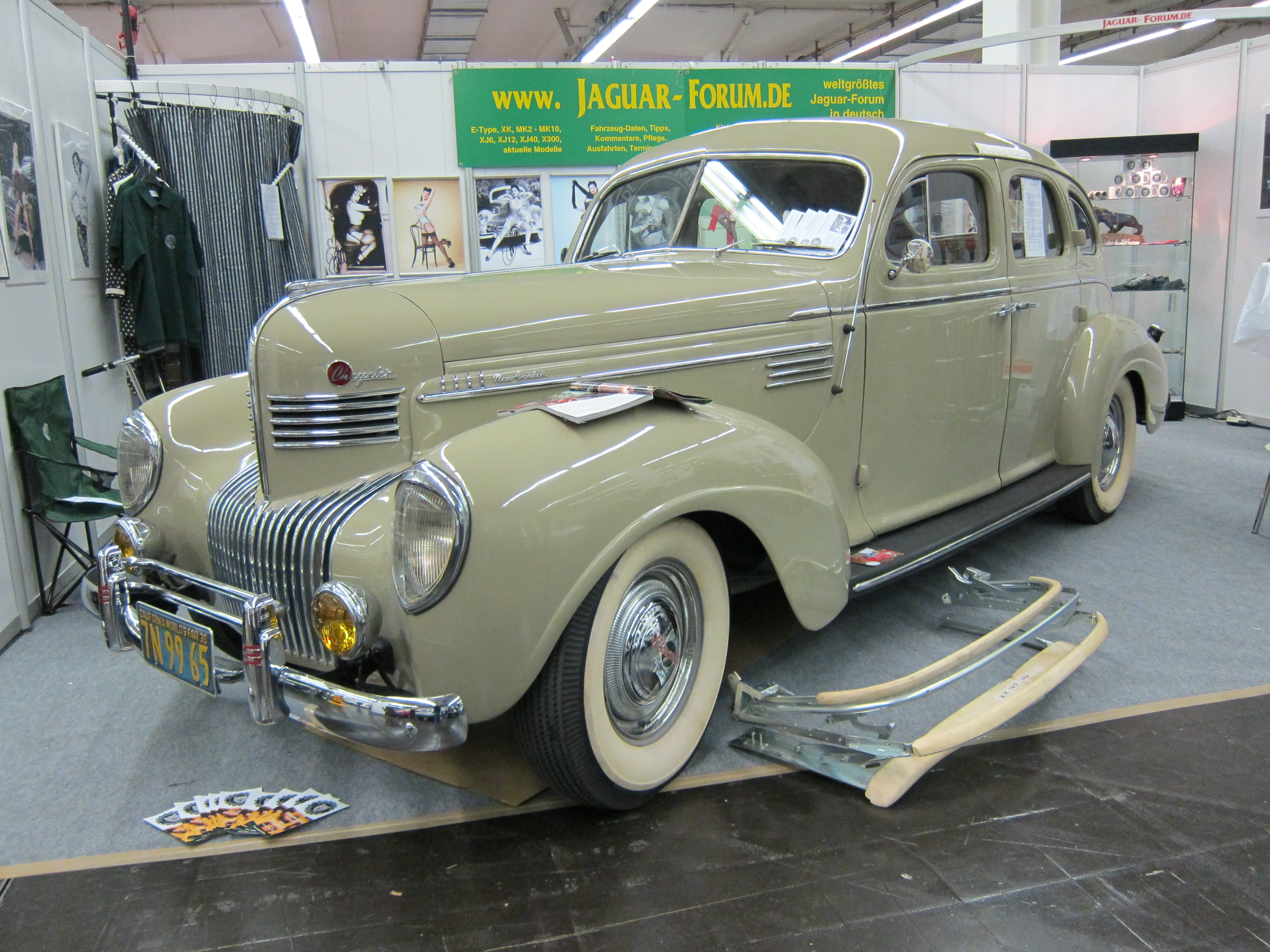 Techno Classica 2012